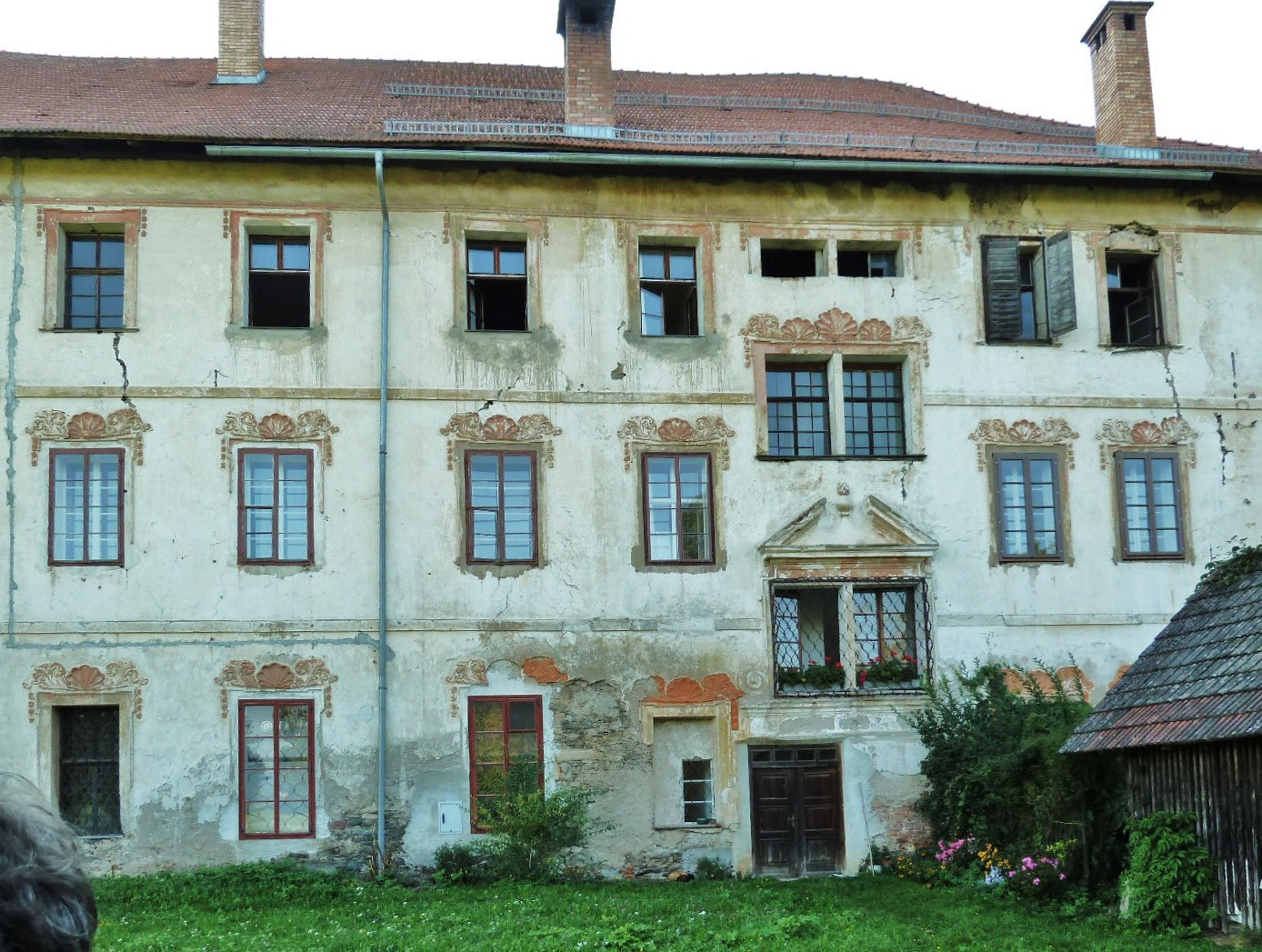 Stift Griffen. Schöne, leider sehr restaurierungsbedürftige barocke Ostfassade des Stiftes.